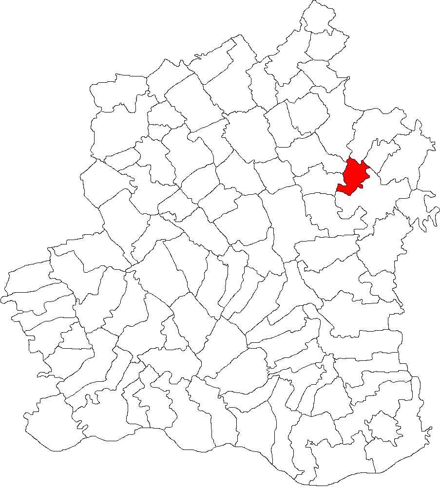 Categorie:Hărţi ale judeţului Teleorman